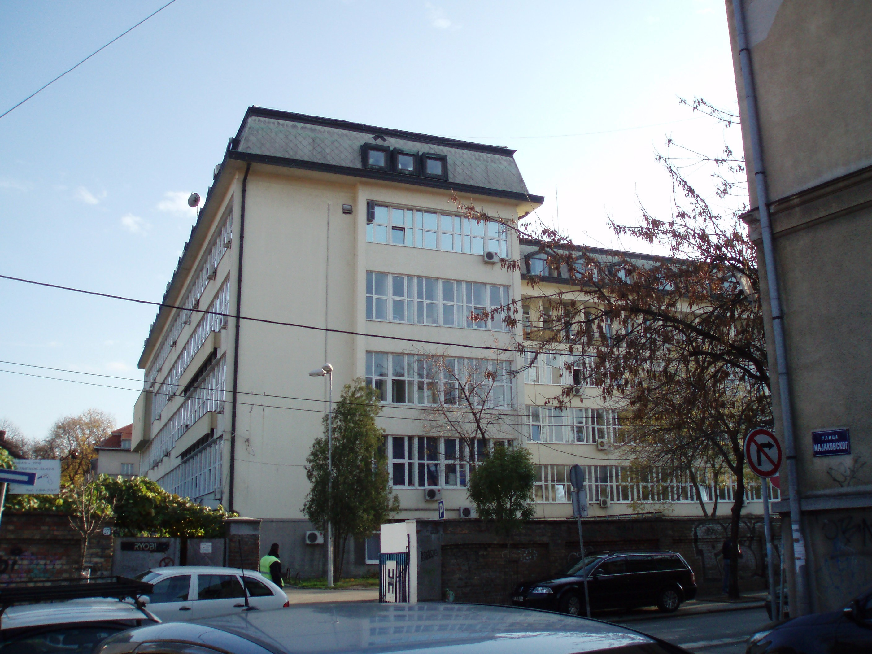 KBC Zemun, novo krilo zgrade, autor fotografije: Nicolo